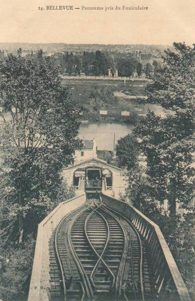 Funiculaire de Meudon-Bellevue